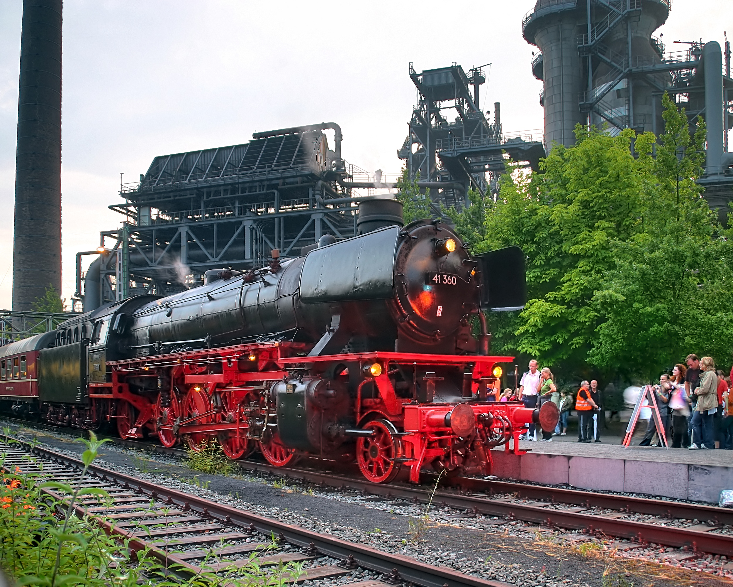 Dampflok DRG 41 360 im Landschaftspark Duisburg-Nord.